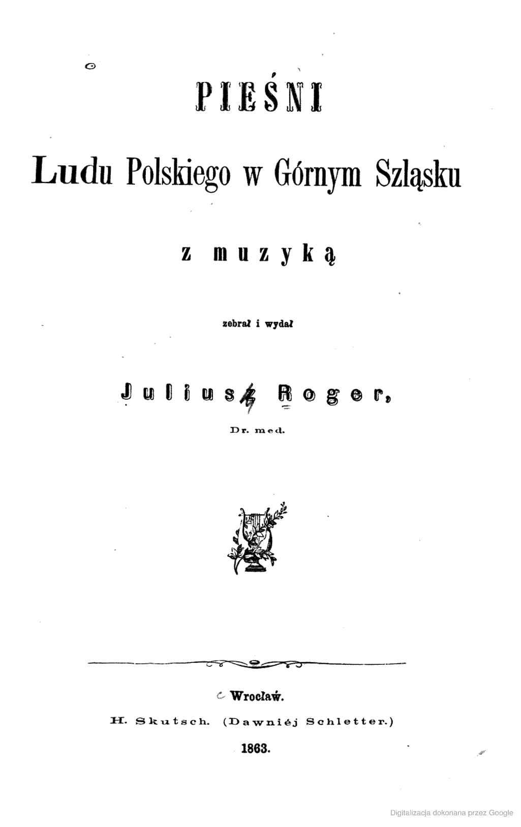 1863 Julius Roger "Pieśni Ludu Polskiego na Górnym Śląsku"